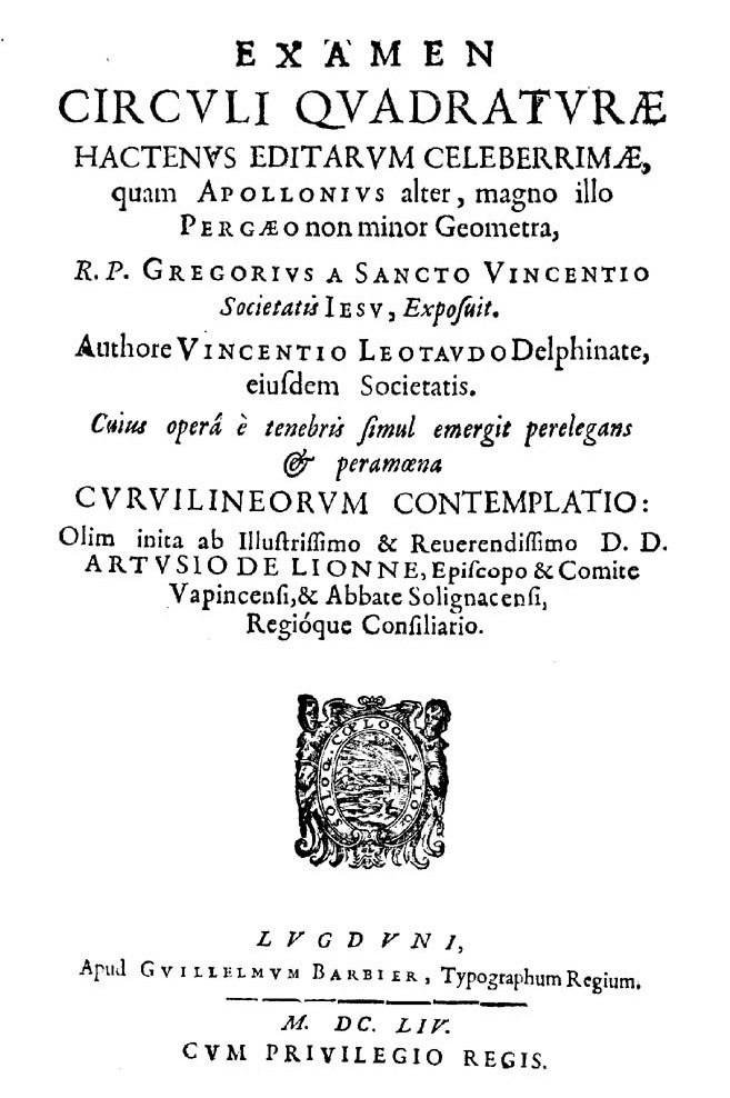 Examen circuli quadraturae hactenus editarum celeberrimae, quam Apollonius alter, magno illo Pergaeo non minor geometra, r.p. Gregorius a Sancto Vincentio Societatis Iesu, exposuit. Authore Vincentio Leotaudo Delphinate, eiusdem societatis. Cuius opera e tenebris simul emergit perelegans & peramoena curuilineorum contemplatio: olim inita ab ... Artusio de Lionne, episcopo & comite Vapincensi, ... . - Lugduni : apud Guillelmum Barbier, typographum regium, 1654. - 2 v. ([28], 116 p., [3] c. di tav. di cui 2 ripieg.; [16], 1-23, [2], 24-296, [24]) p. : ill. in parte calcogr., 1 ritr. ; 4º. - Tit. dell'occh. della pt. 1: Curuilineorum amoenior contemplatio. - Tit. dell'occh. della pt. 2: Pars secunda circuli quadraturae, a r.p. Greg. a S Vincentio, …, propositae examen a p. Vincentio Leotaudo. - Vignette calcogr. incise da Audran. - Ritr. calcogr. di Hugo de Lionne firmato R. Nantueil .